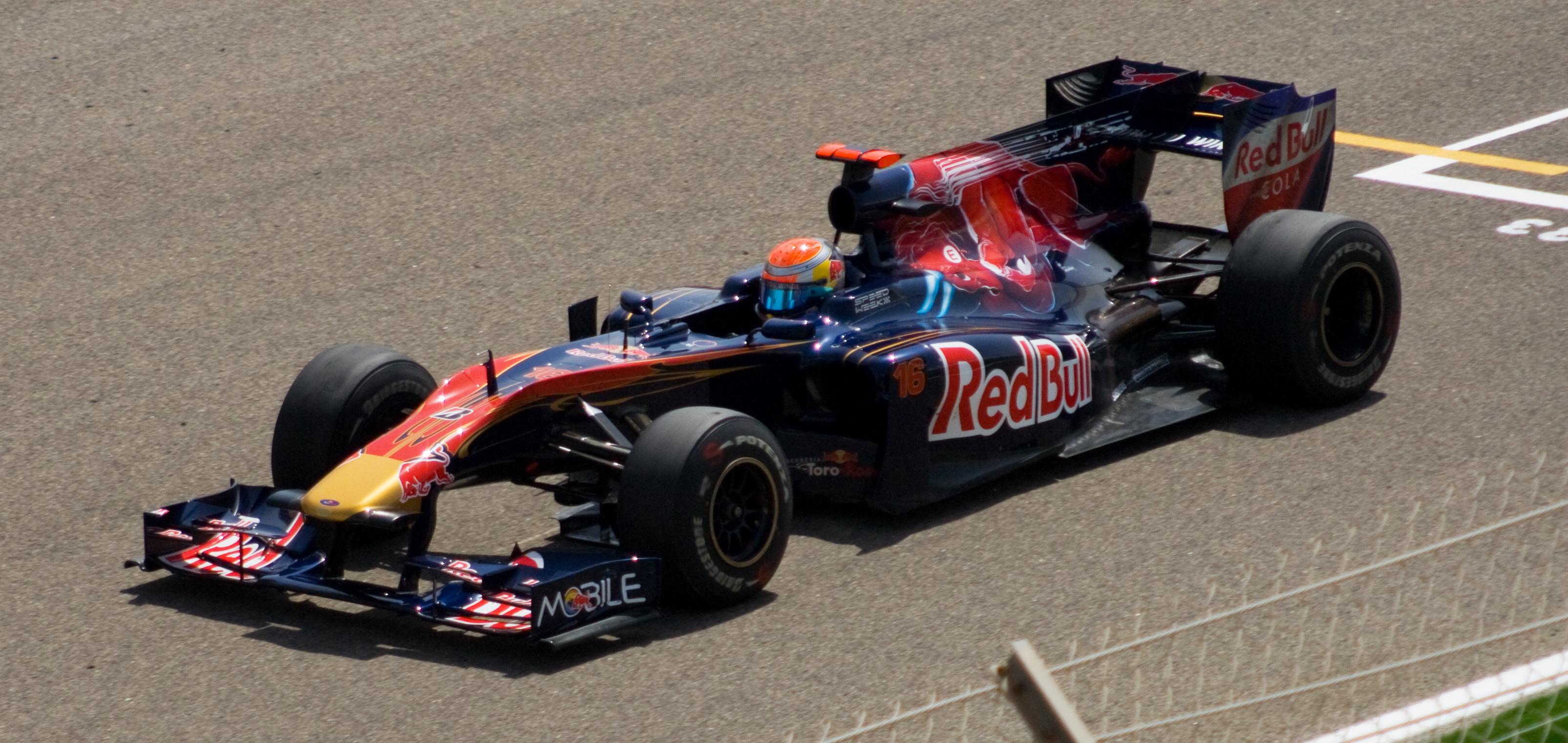 STR5